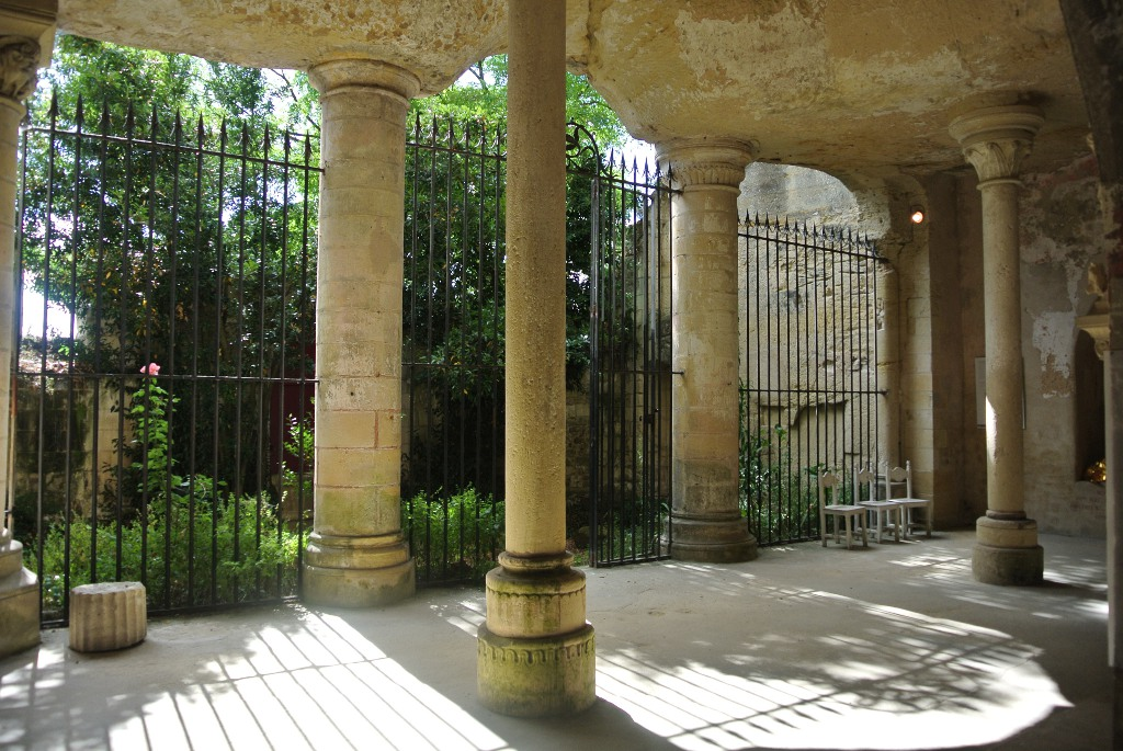 Nef de la chapelle actuelle